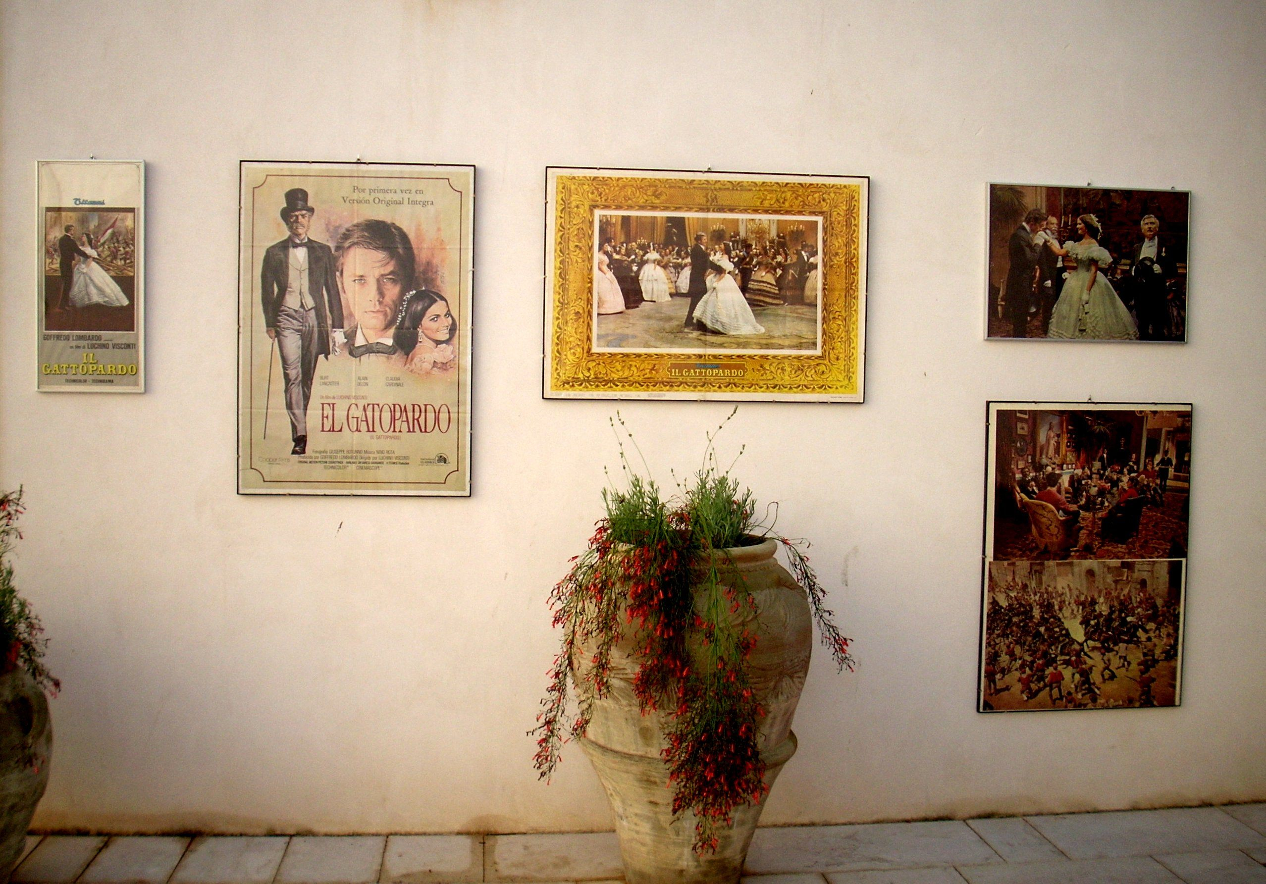 Il Gattopardo : Rassegna cinematografica alla Badia Grande di Sciacca in Sicilia – Italia.